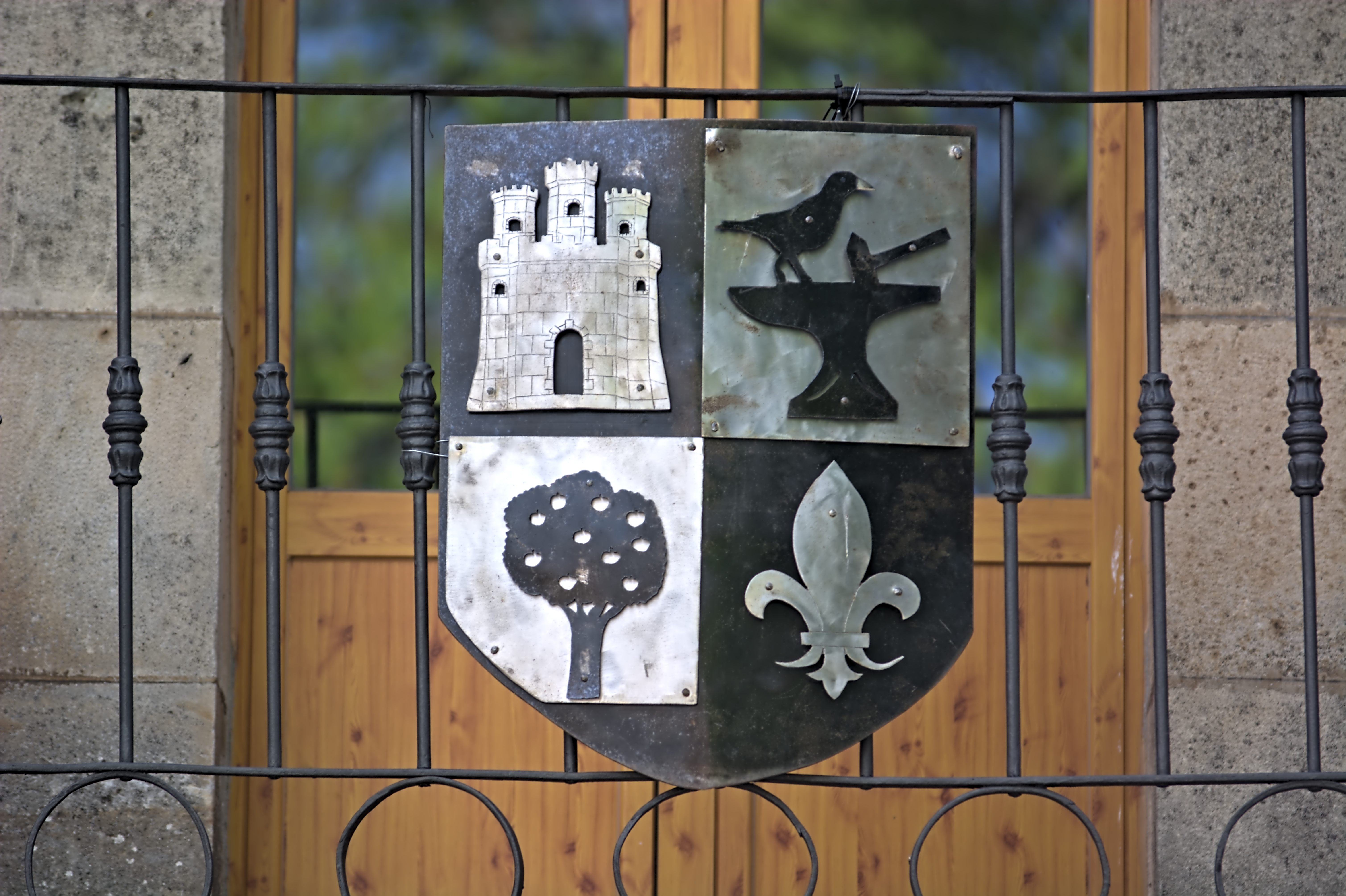 Barbadillo de Herreros